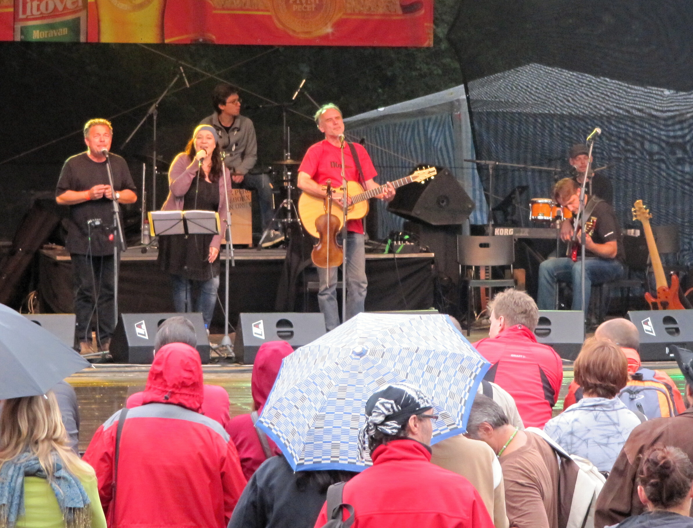 Neřež v roce 2012 se zpěvačkou Katarínou Koščovou